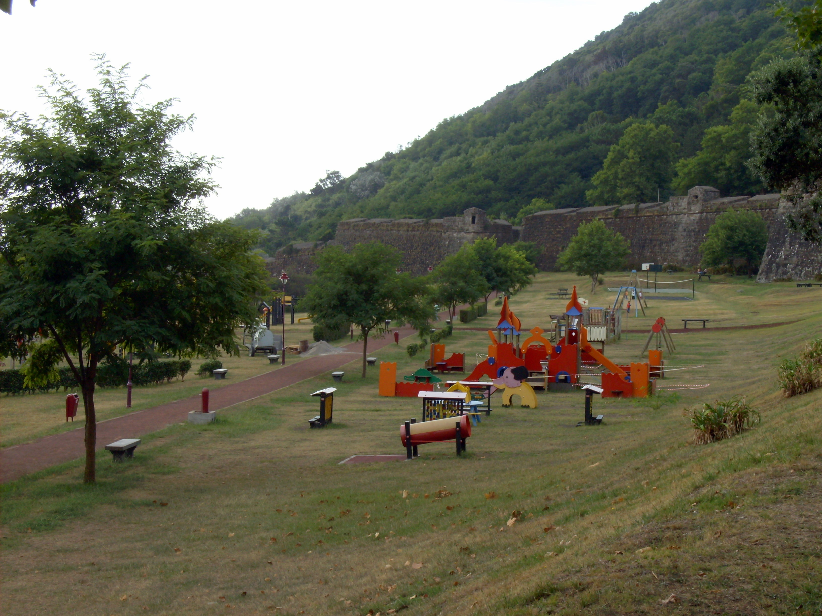 Parque Municipal do Relvão, Angra do Heroísmo, Ilha Tereira, Açores: parque infantil.